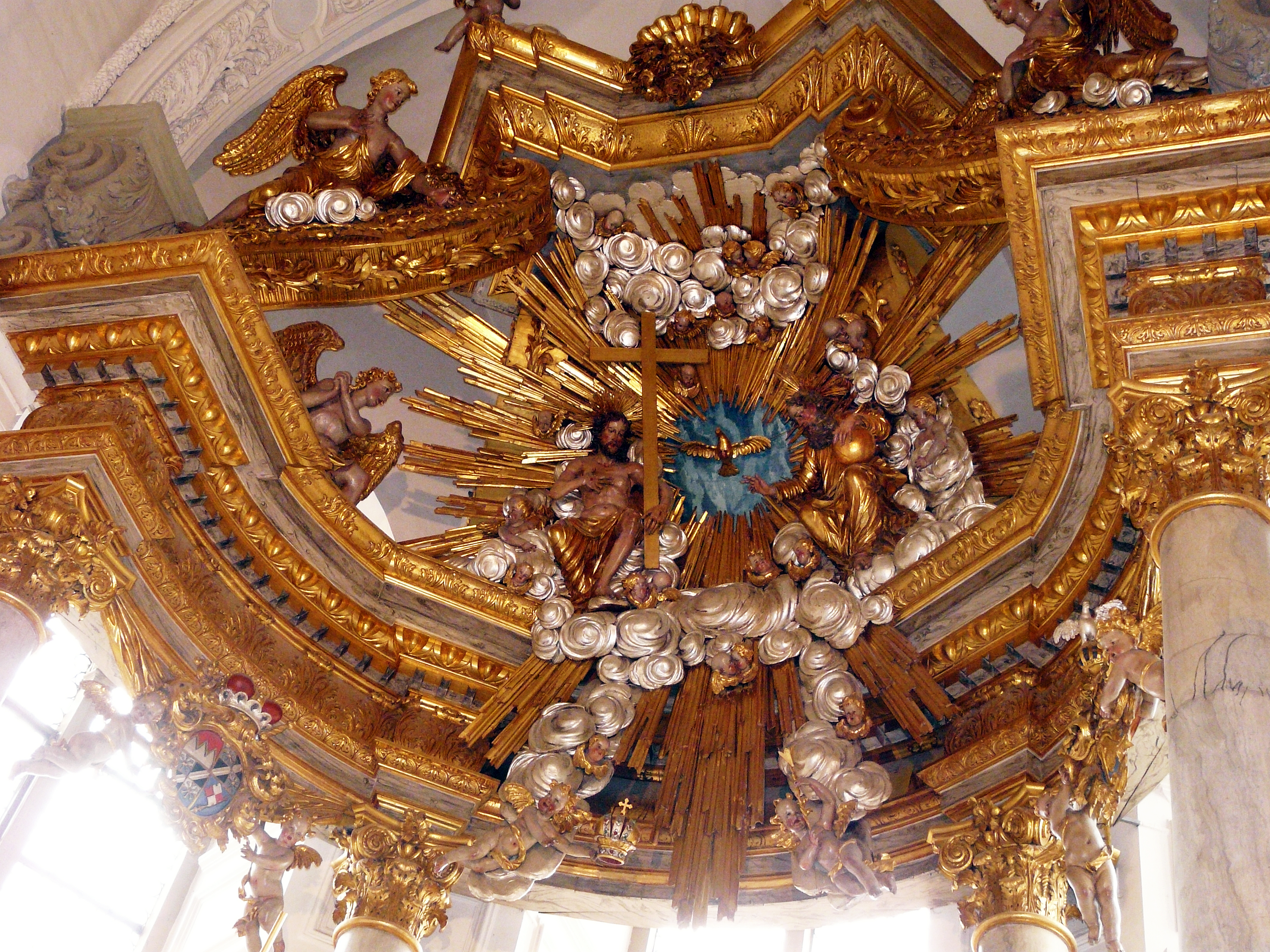 Оформление потолка над алтарём церкви Св. Николая